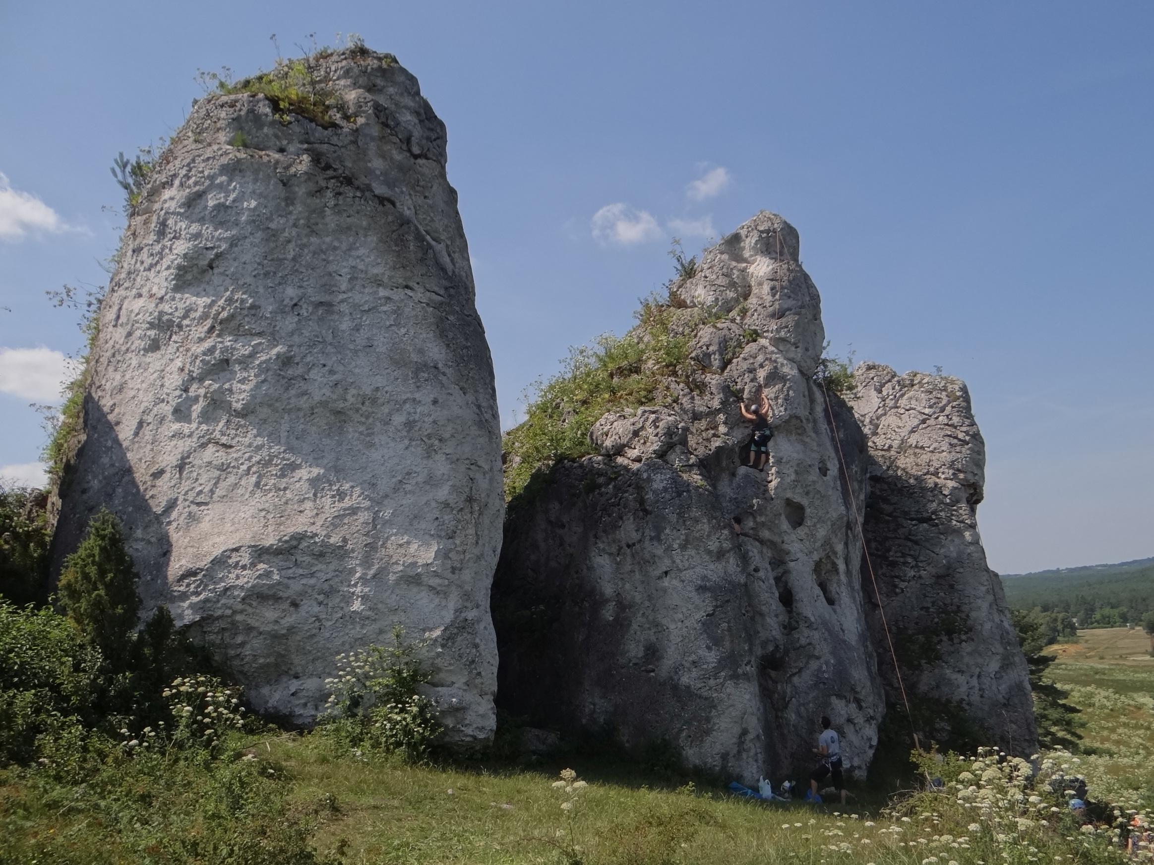 Skały Mirowskie. Grupa Trzech Sióstr